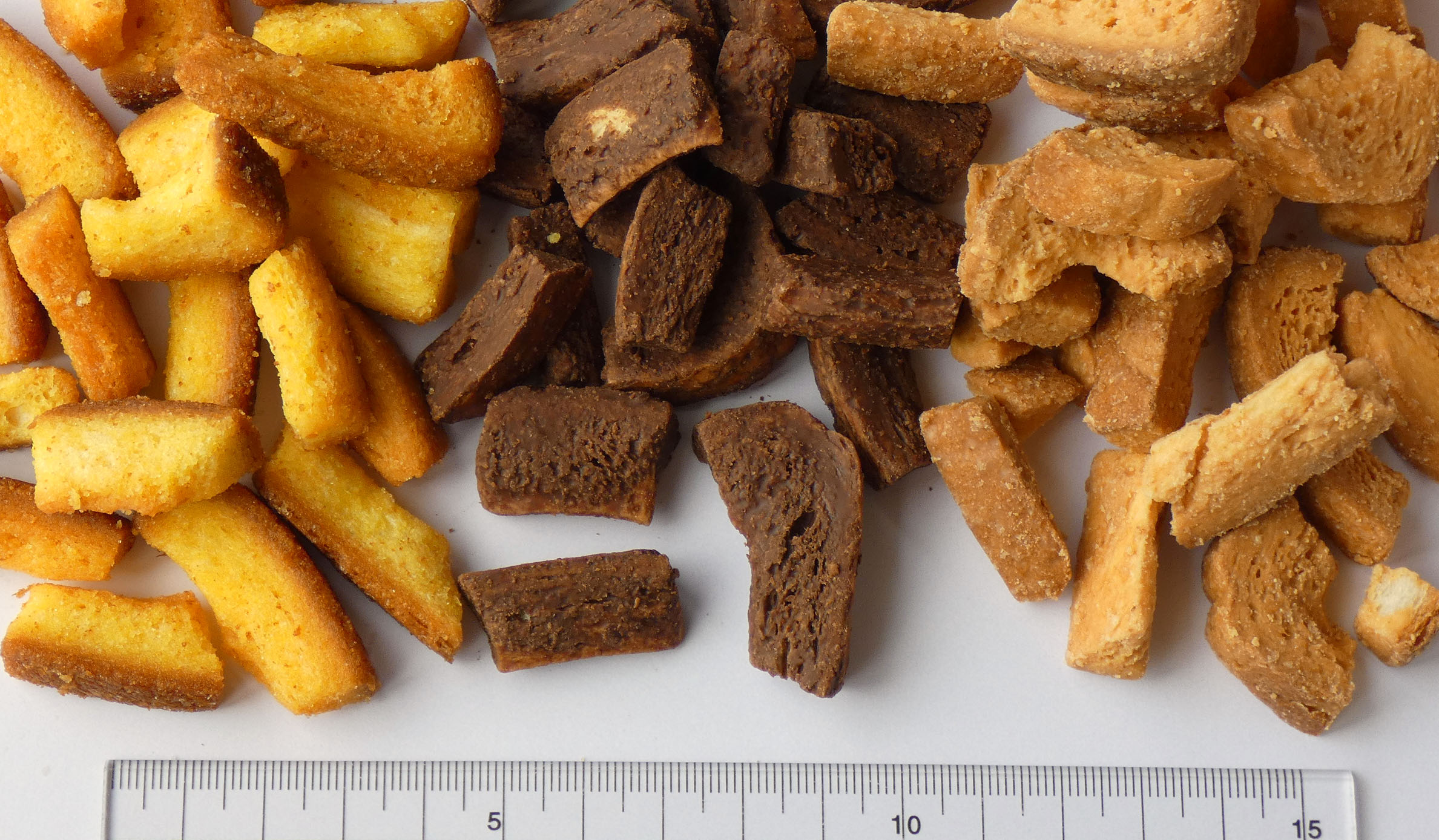 ちょいパクラスク（フレンチトースト味、チョコ味、ピーナッツ味）